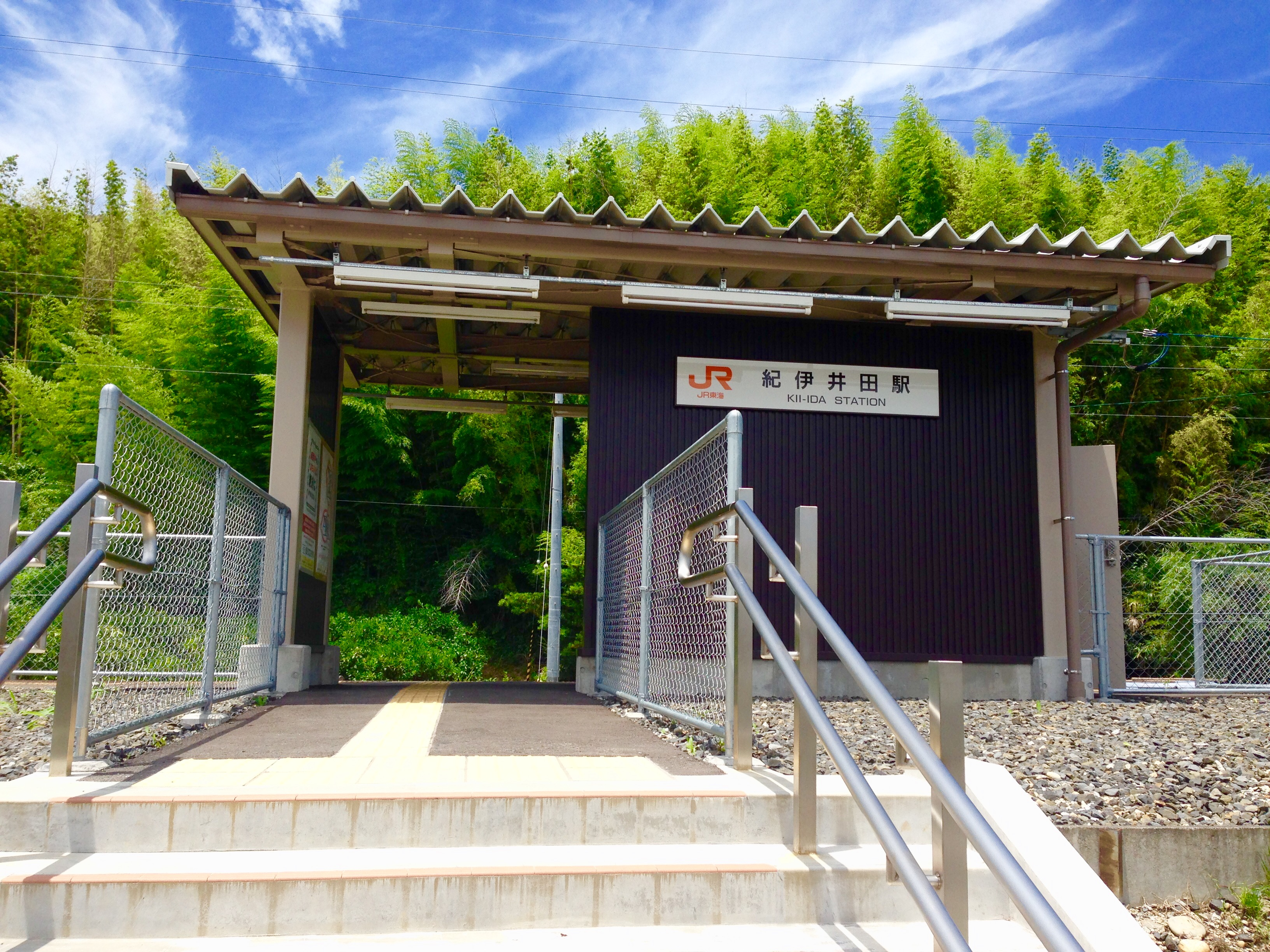 2013年撮影の紀伊井田駅